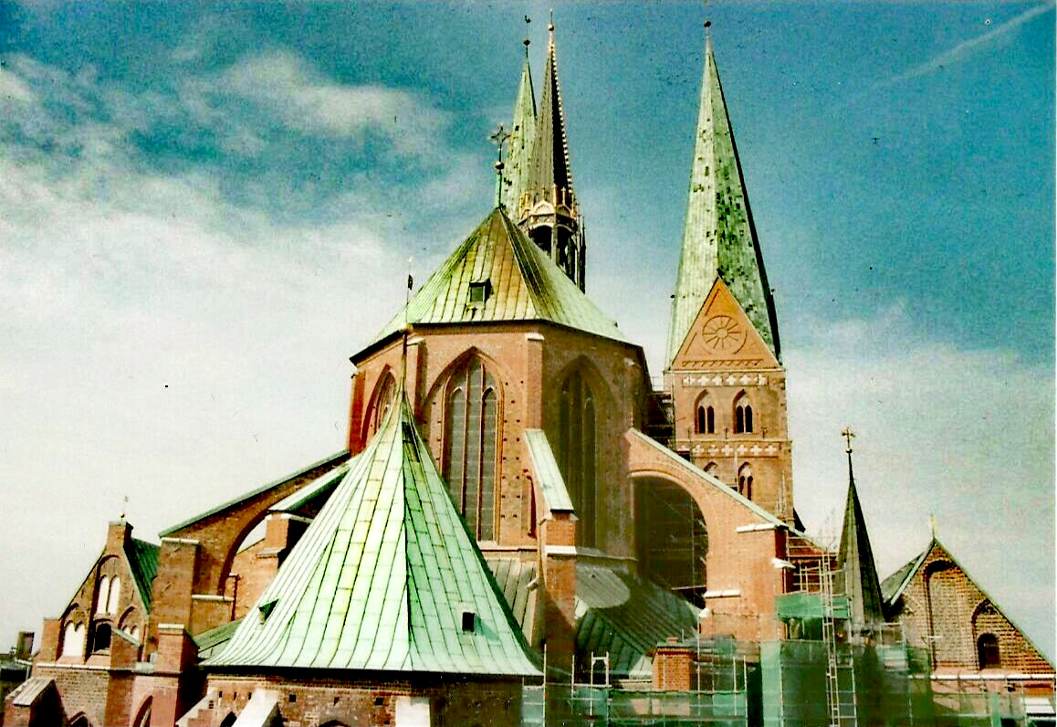 Marienkirche in Lübeck von Osten